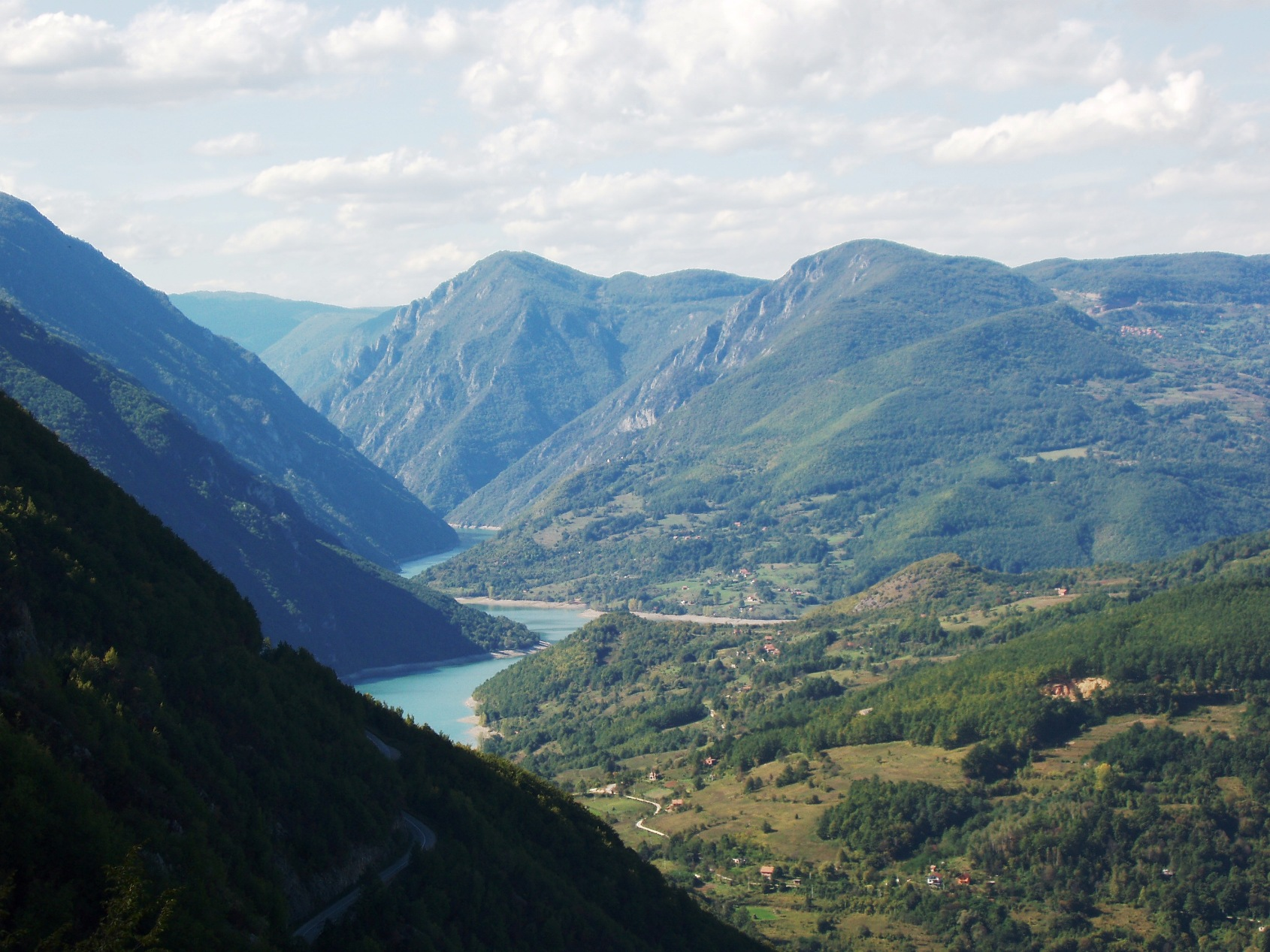 Perućac lake - Језеро Перућац